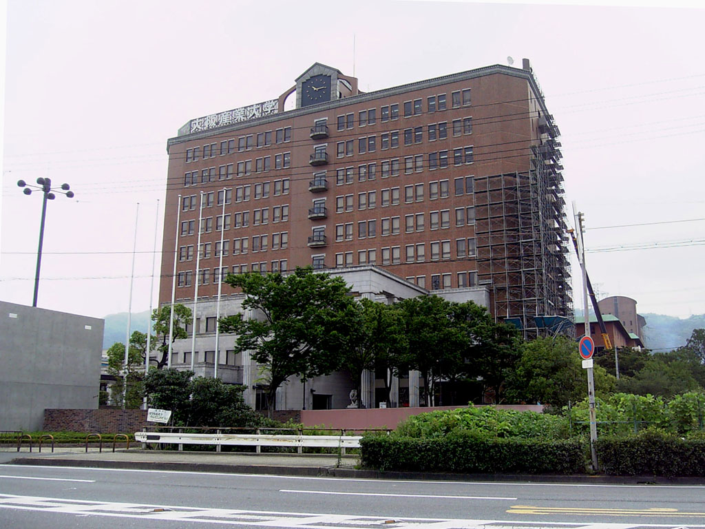 大阪産業大学 (大阪府ja:大東市) 2006年7月撮影。 機材：V604SH 撮影者：Kansai explorer 撮影後トリミング・レタッチ・リサイズ